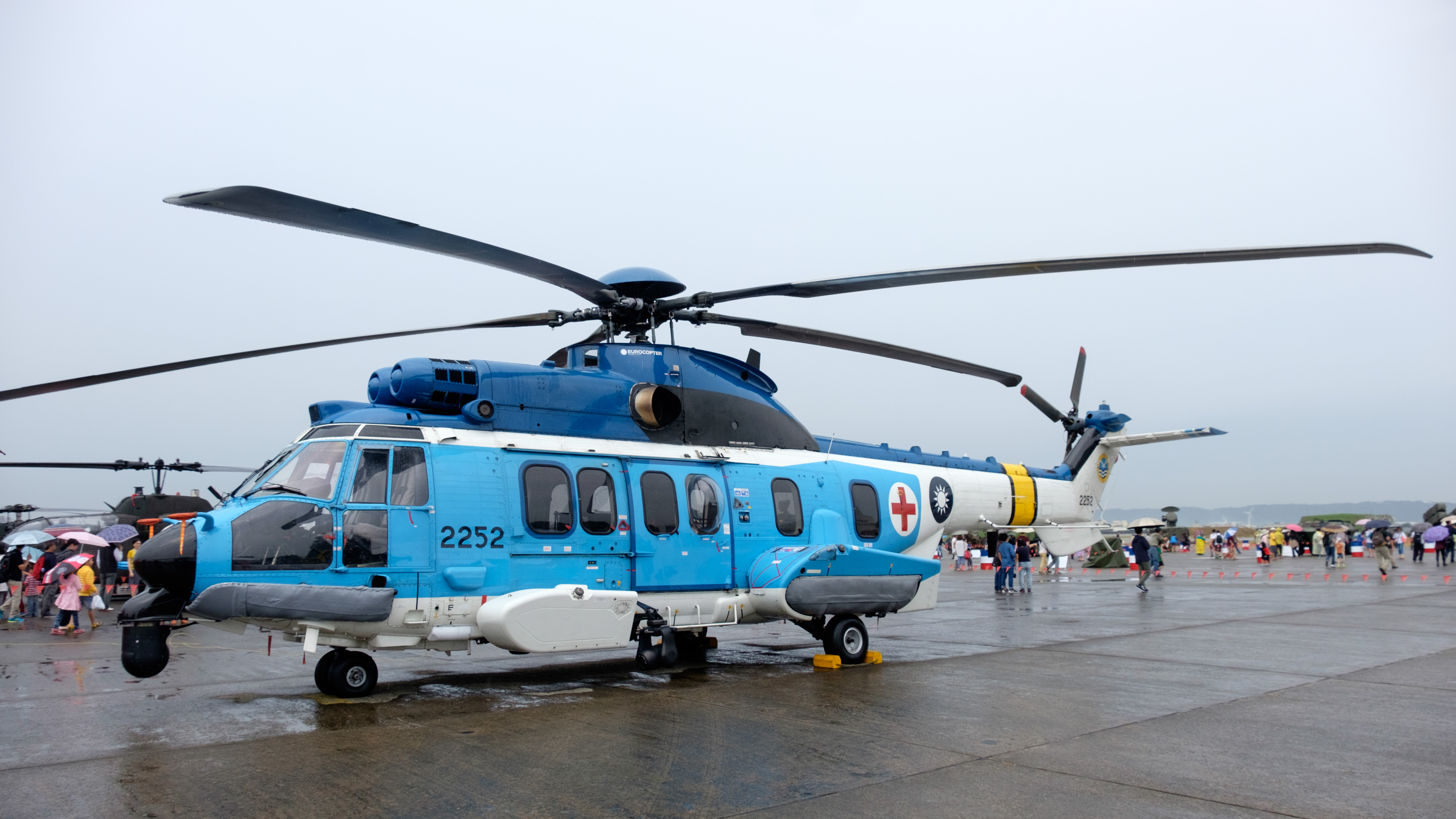 2015年空軍新竹基地營區開放活動，停機坪展示的空軍救護隊EC 225 2252救難直昇機左前方。